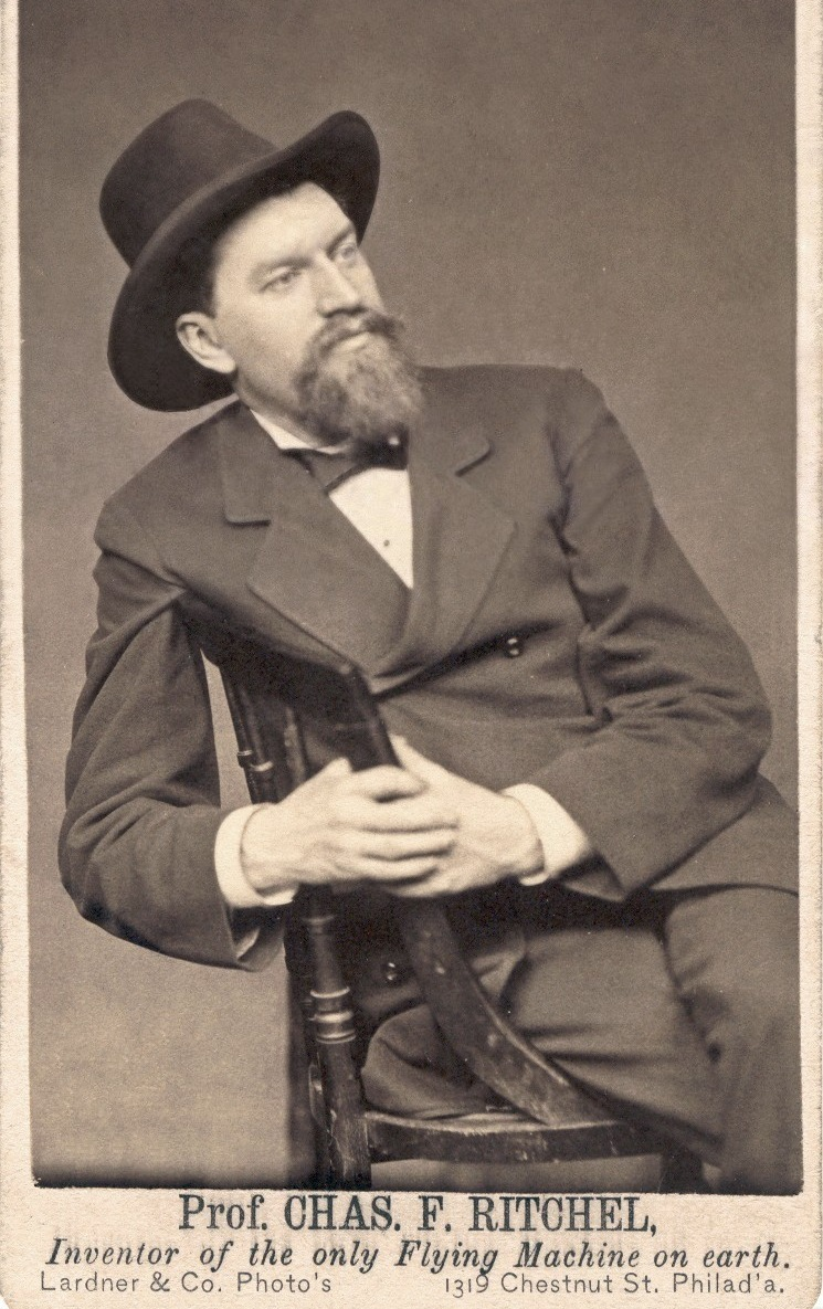 C.F. Ritchel (c. 1840–1911), Carte de Visite